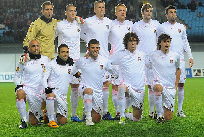 Palermo FC 2010